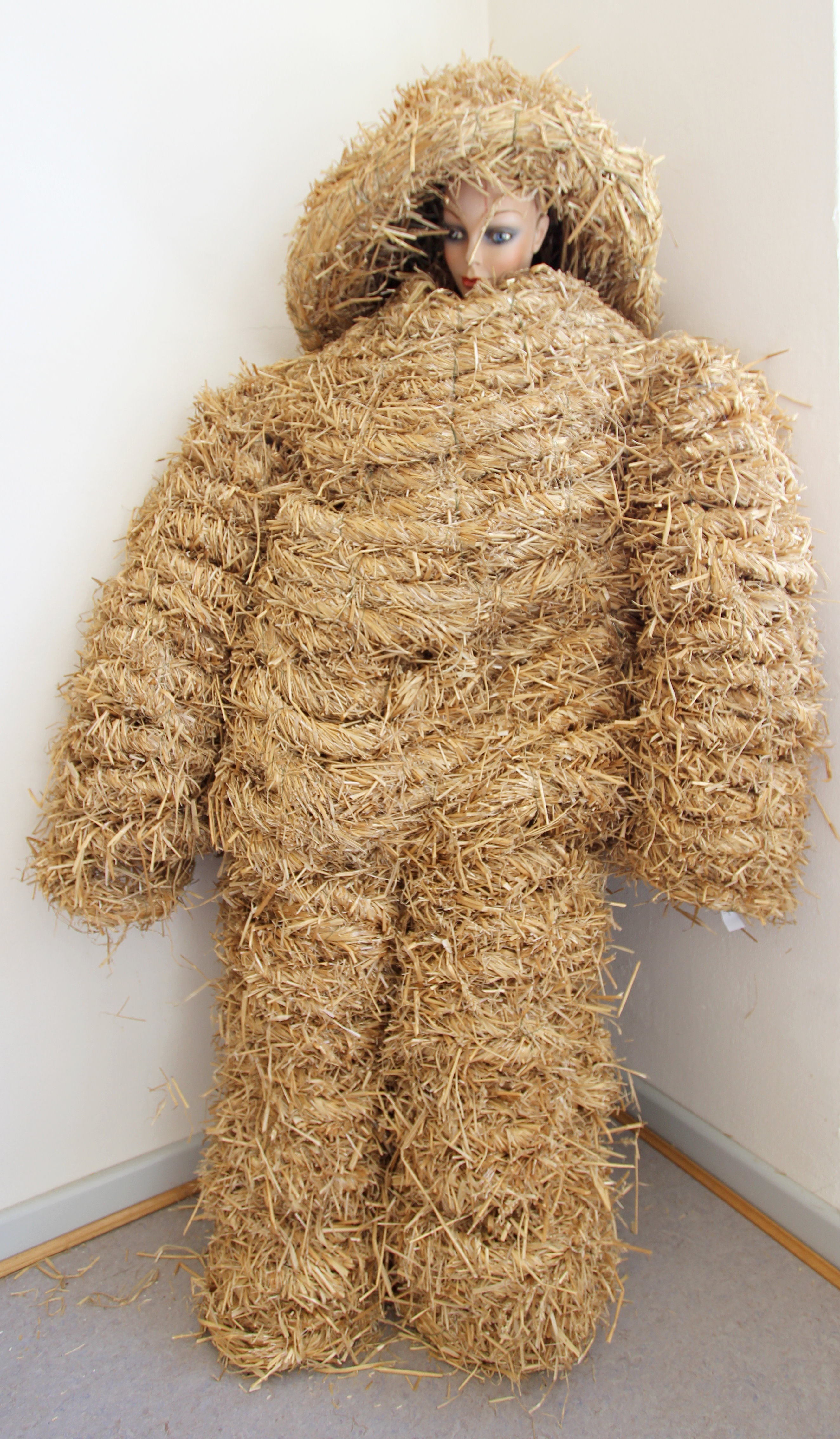 54634 Bitburg-Mötsch. Strohbär-Kostüm aus Mötsch/Eifel um 1990 für das alljährliche Brauchtumsfest am Fastnachtsdienstag. Das Kostüm ist im Kreismuseum Bitburg-Prüm zu sehen. Aufnahme von 2018.